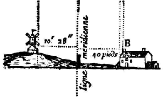 Dessin de la localisation de la Mire Nord de Picard.